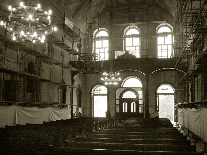 Interior da Igreja das Dores durante seu restauro, Porto Alegre, Brasil.